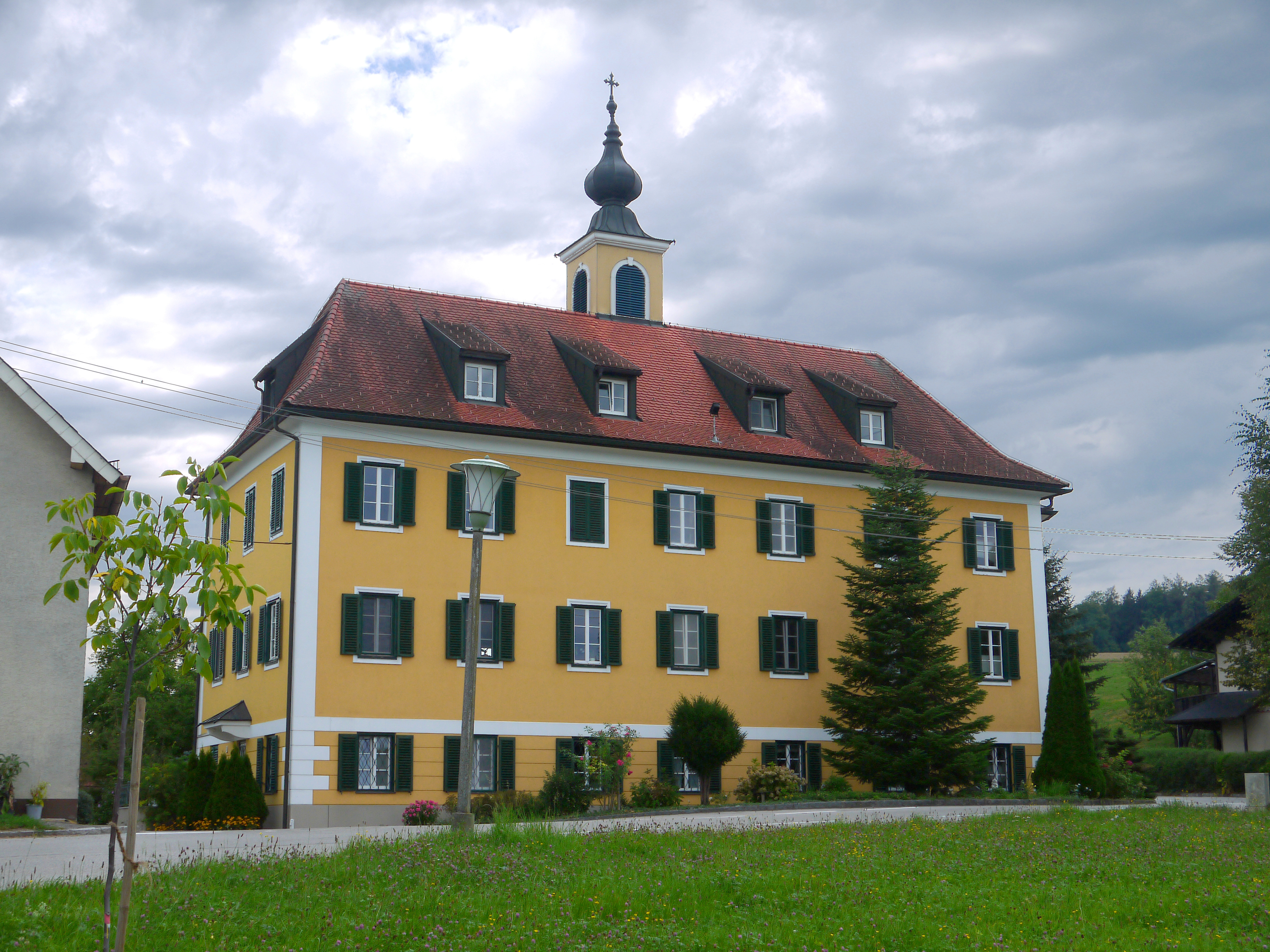 Ehem. Bürgerspital/Herrschaftsspital